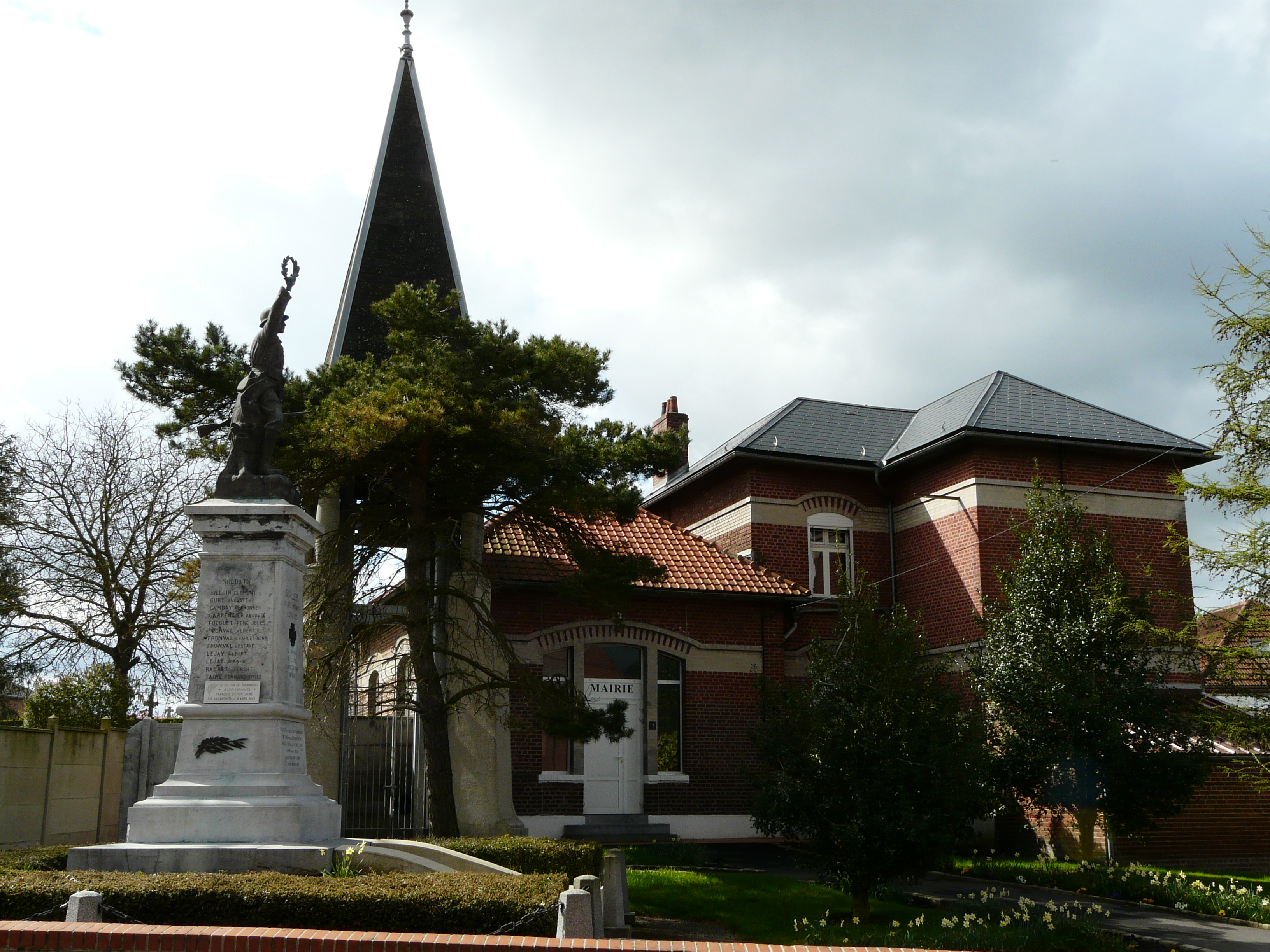 La mairie de Cuvillers (Nord), clocher et monument aux morts